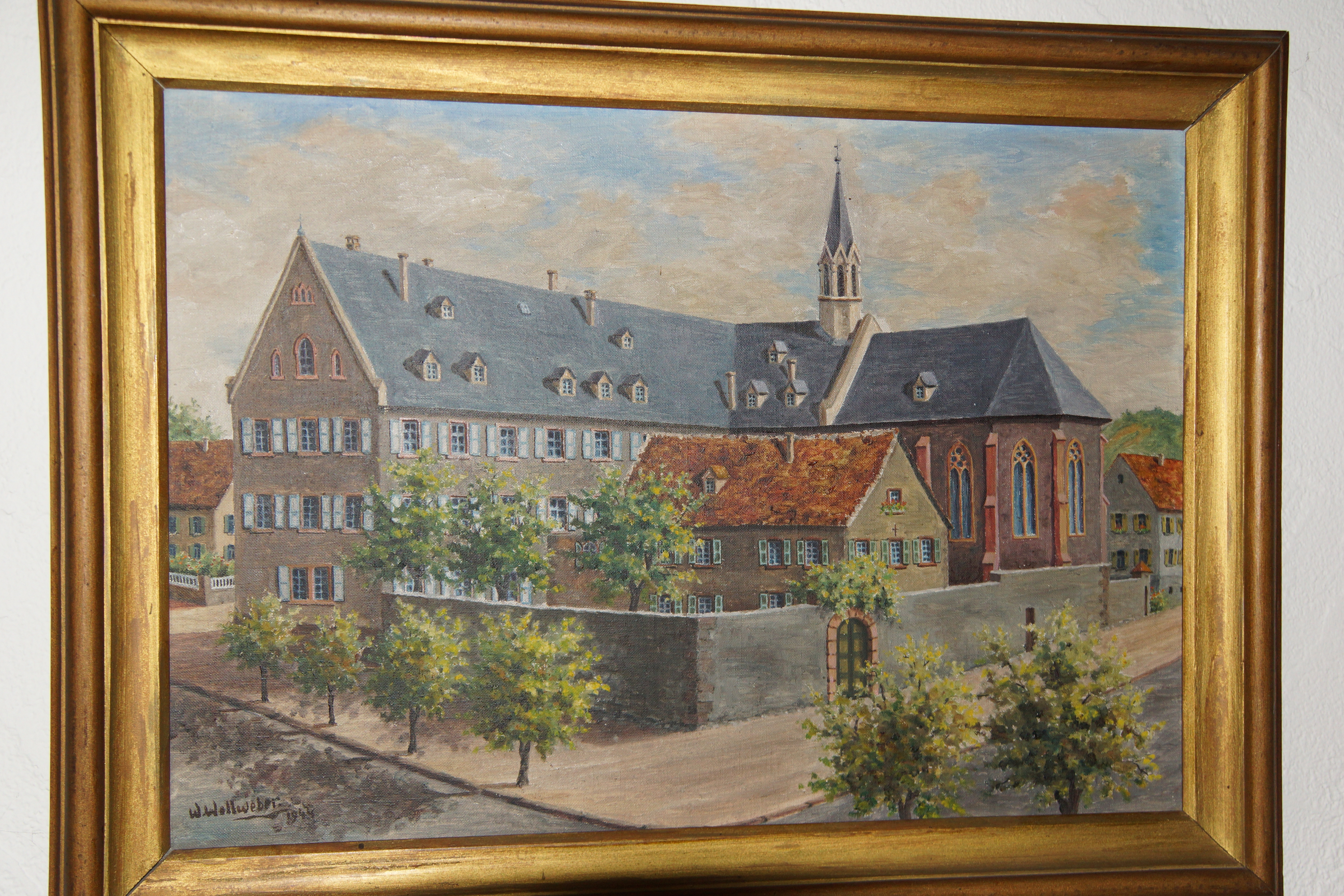 Neumarkt Oberpfalz, Kloster St. Josef